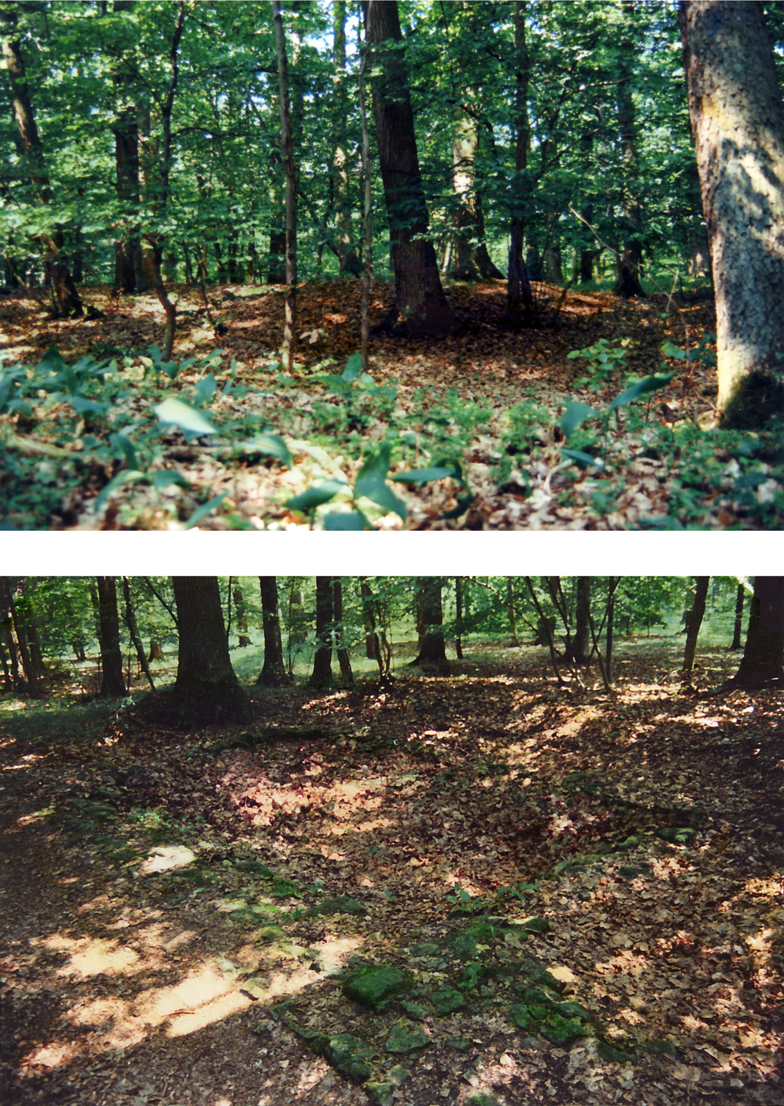 Obergermanisch-Rätischer Limes bei WP 14/6. Das Bild oben zeigt den Holzturmhügel. Nach den Markomannenkriegen (166-180) wurde er aufgegeben und durch den nahegelegenen 5,4 x 4,4 Meter durchmessenden Steinturm ersetzt. Als Besonderheit besaß der an die Limesmauer gebaute Hügel einen ebenerdigen Zugang. Die Limesmauer ist hier 1,2 Meter breit. Zerstört während der Alamanneneinfälle 259/60. Zustand im Juli 1997.